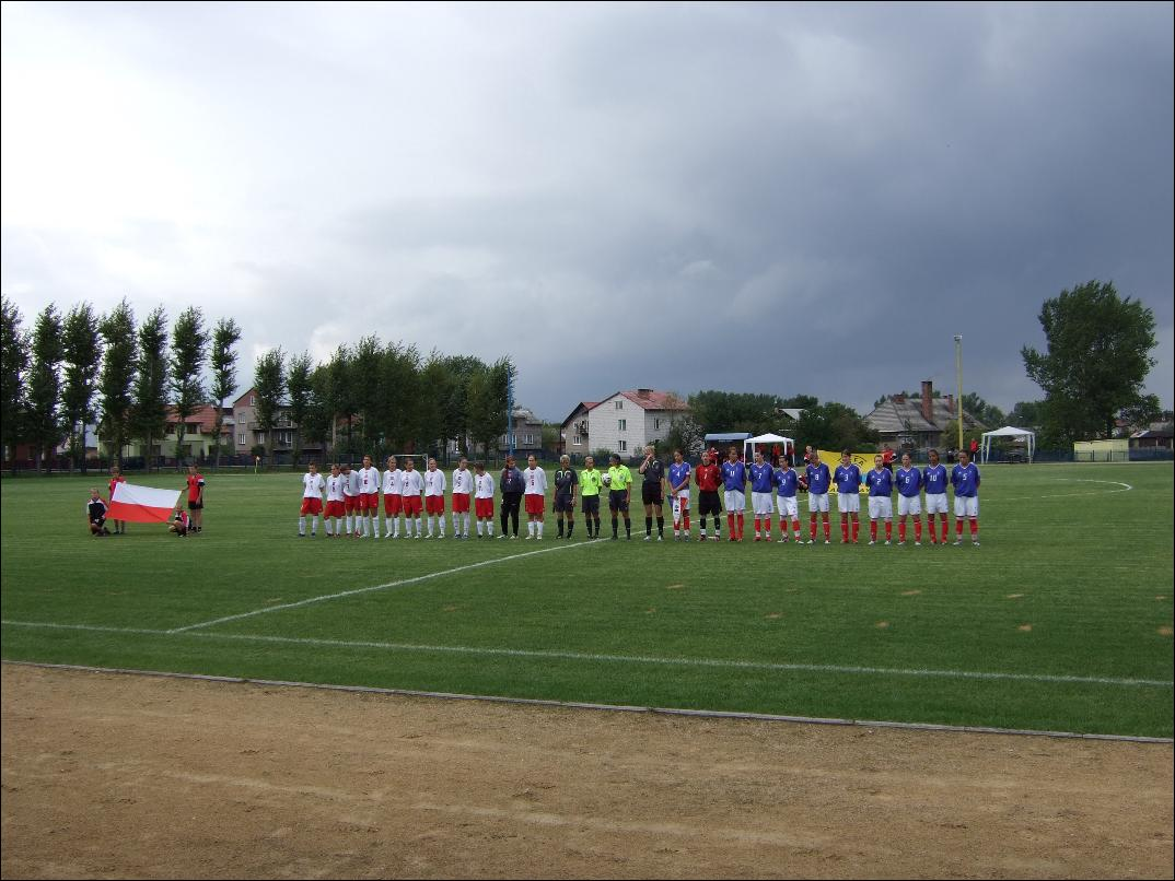 mecz piłki nożnej kobiet U17 Polska-Fracja na stadionie LKS Trzy Korony Żarnowiec